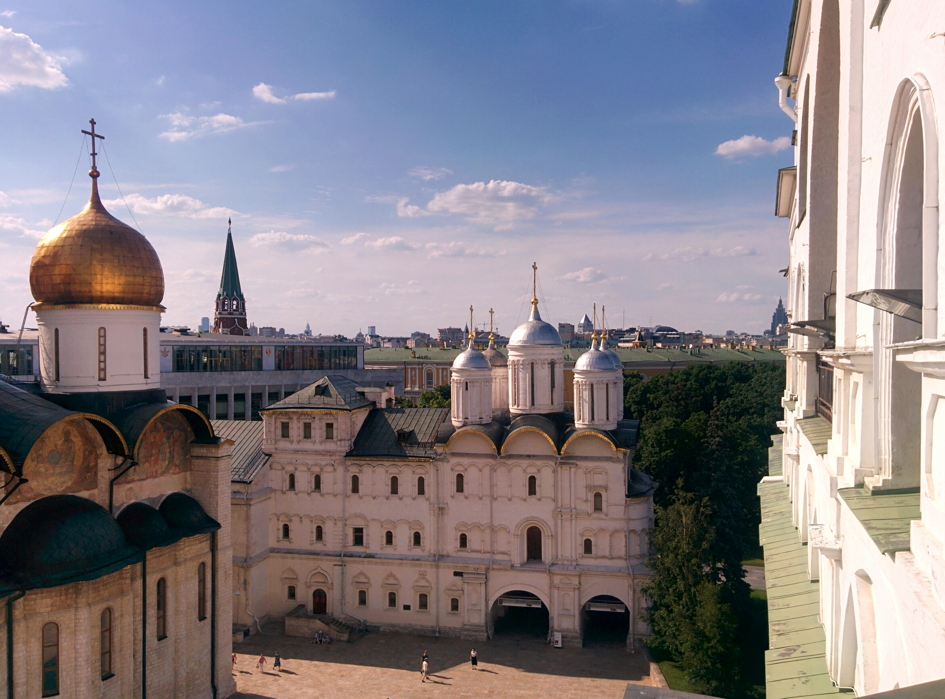 Патриаршие палаты с церковью Двенадцати апостолов: нет адреса БТИ, Тверской, Центральный округ, Москва